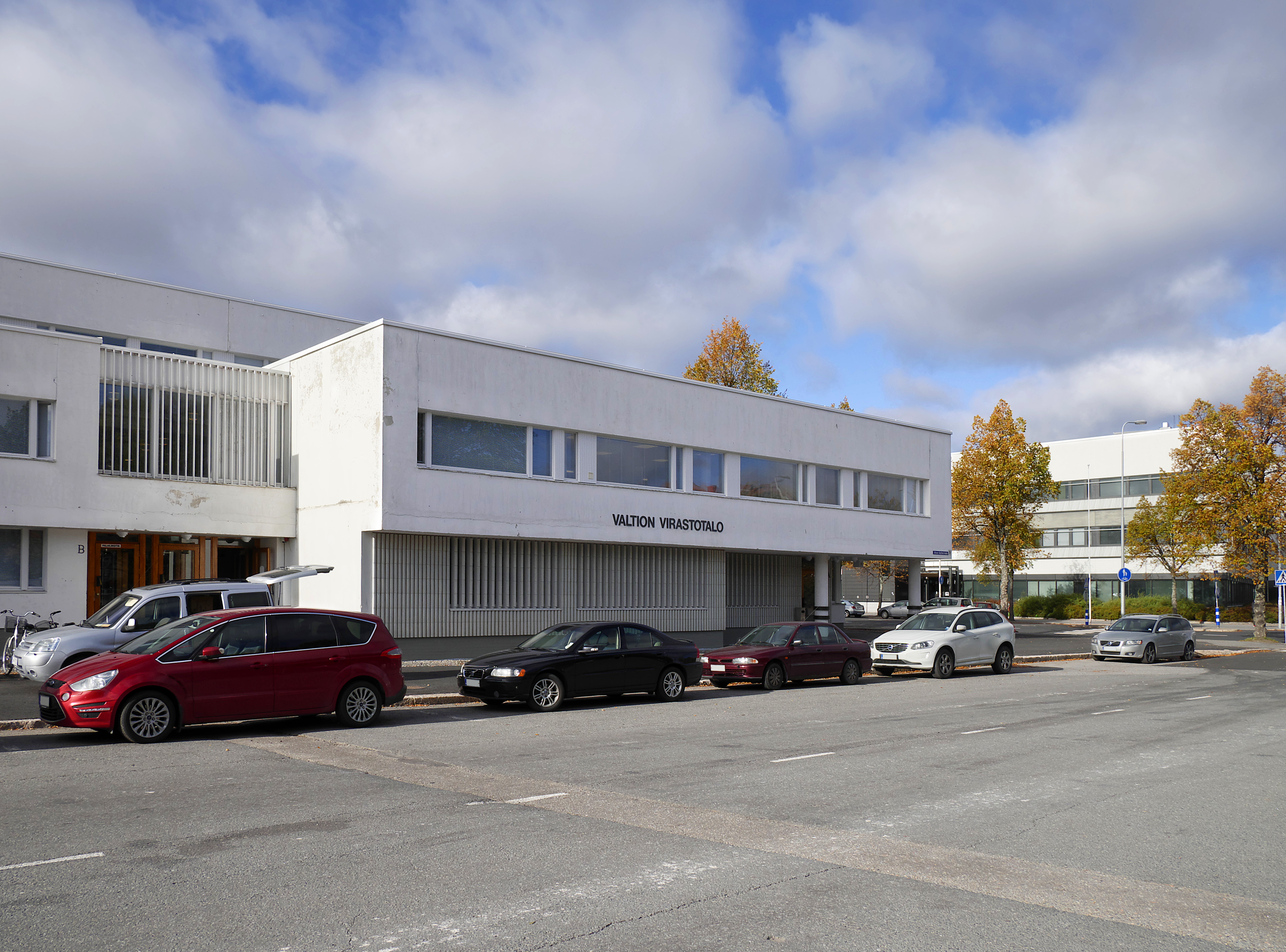 Valtion virastotalo Seinäjoella.